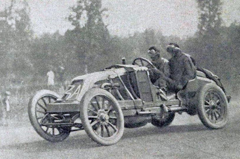 Ferenc Szisz durant le Grand Prix de l'ACF 1906.